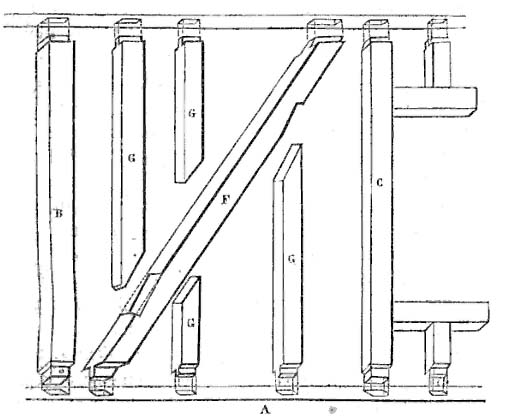 Assemblages utilisé dans un pan de bois